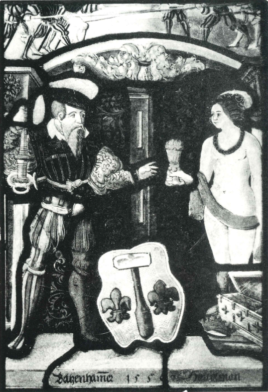 Wappenscheibe des Batzenhammer Hauptmanns Hans GermannSammlung Wilczek, Burg Kreuzenstein an der Donau